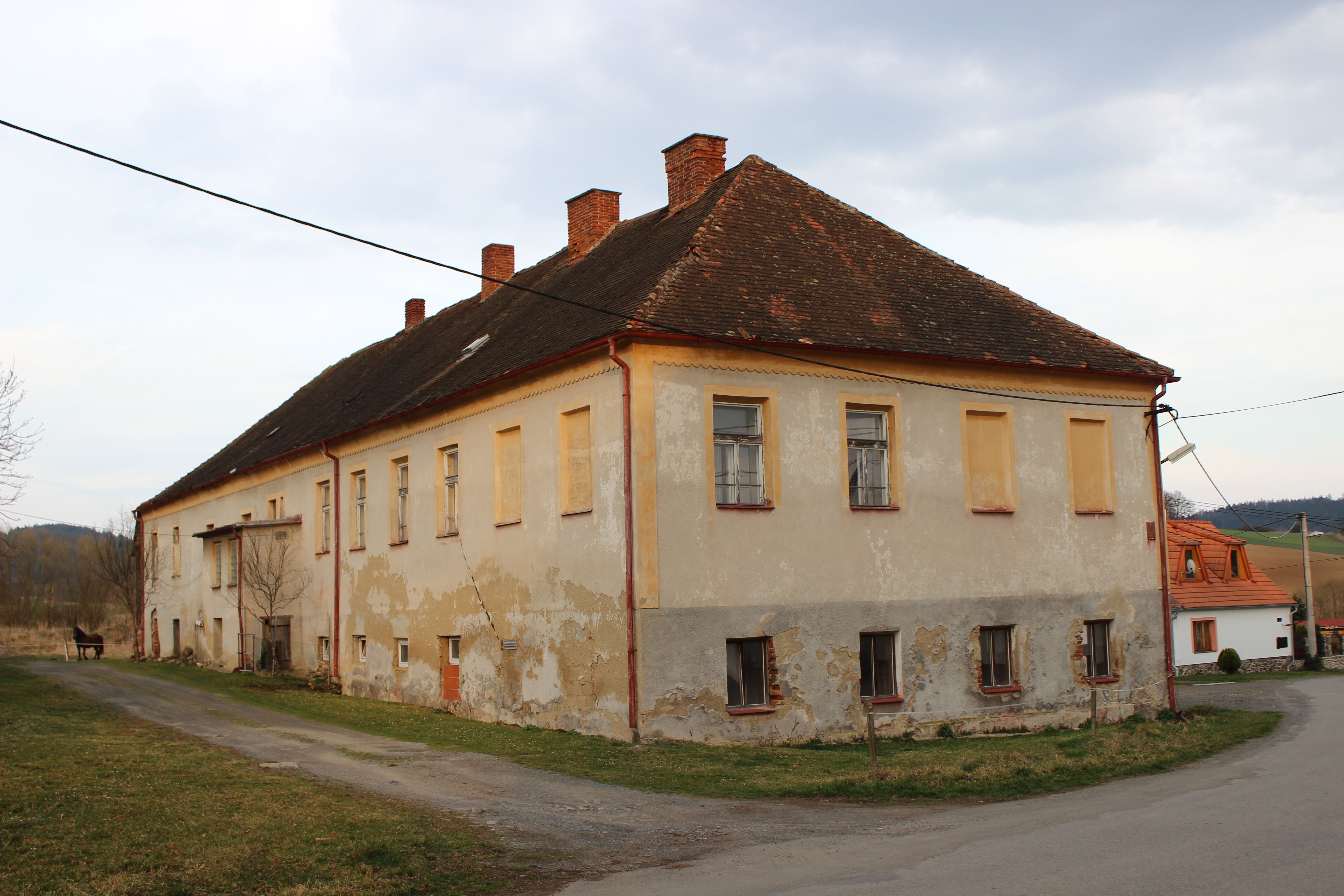 Zámek (dům číslo popisné 16) v Krchlebech. This photograph was taken with a Canon EOS 600D.